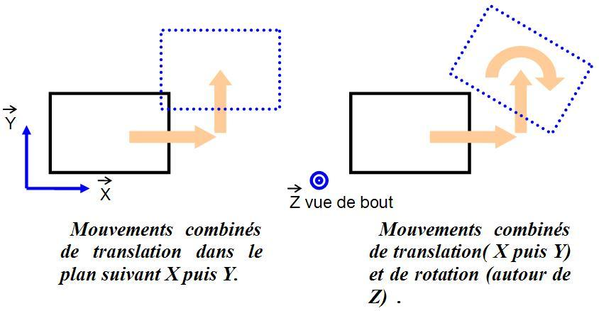 schéma dont je suis l'auteur illustration de cours de mécanique.